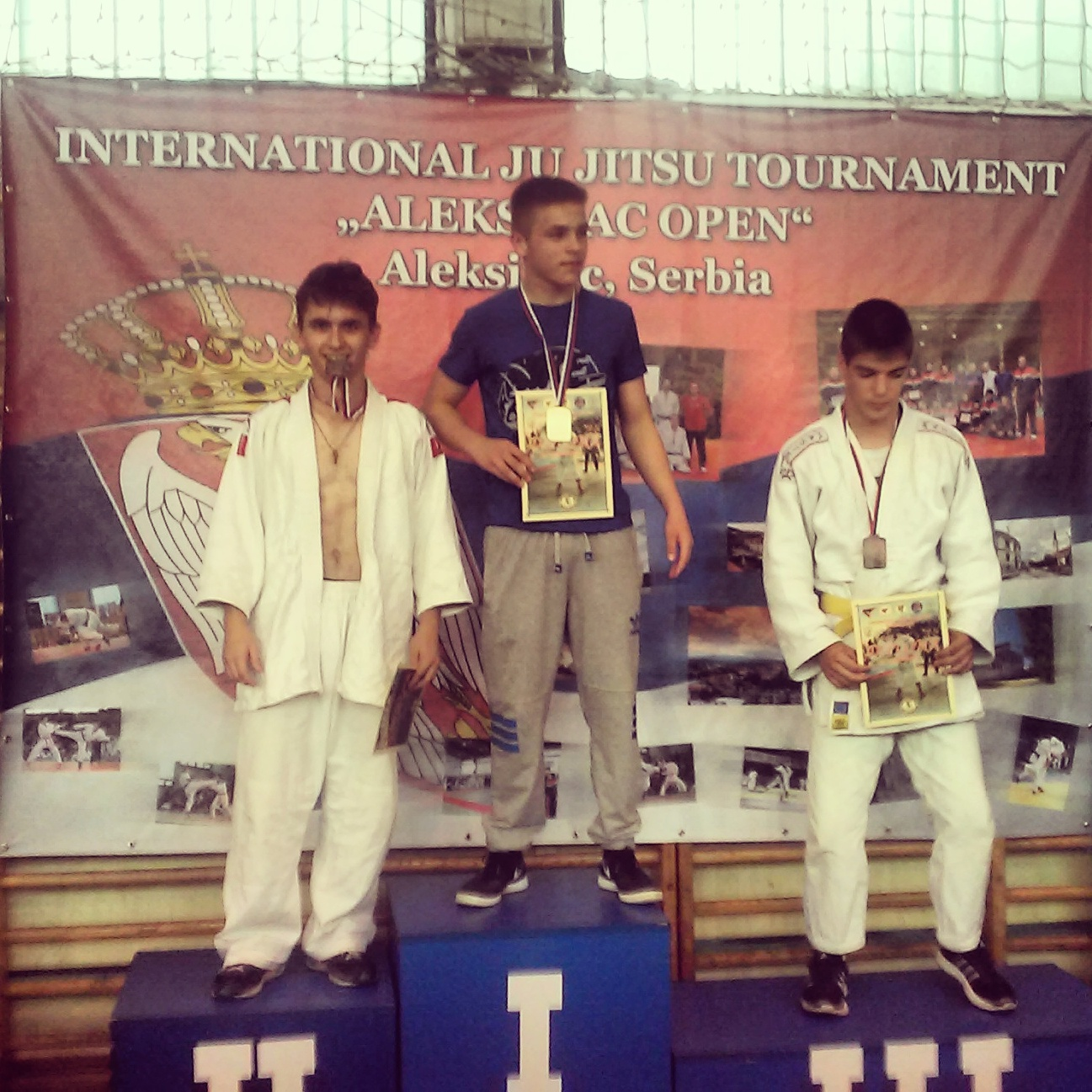 Petar Jevremovic na Aleksinac Open-u 2016.godine